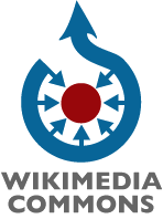 Commons Logo